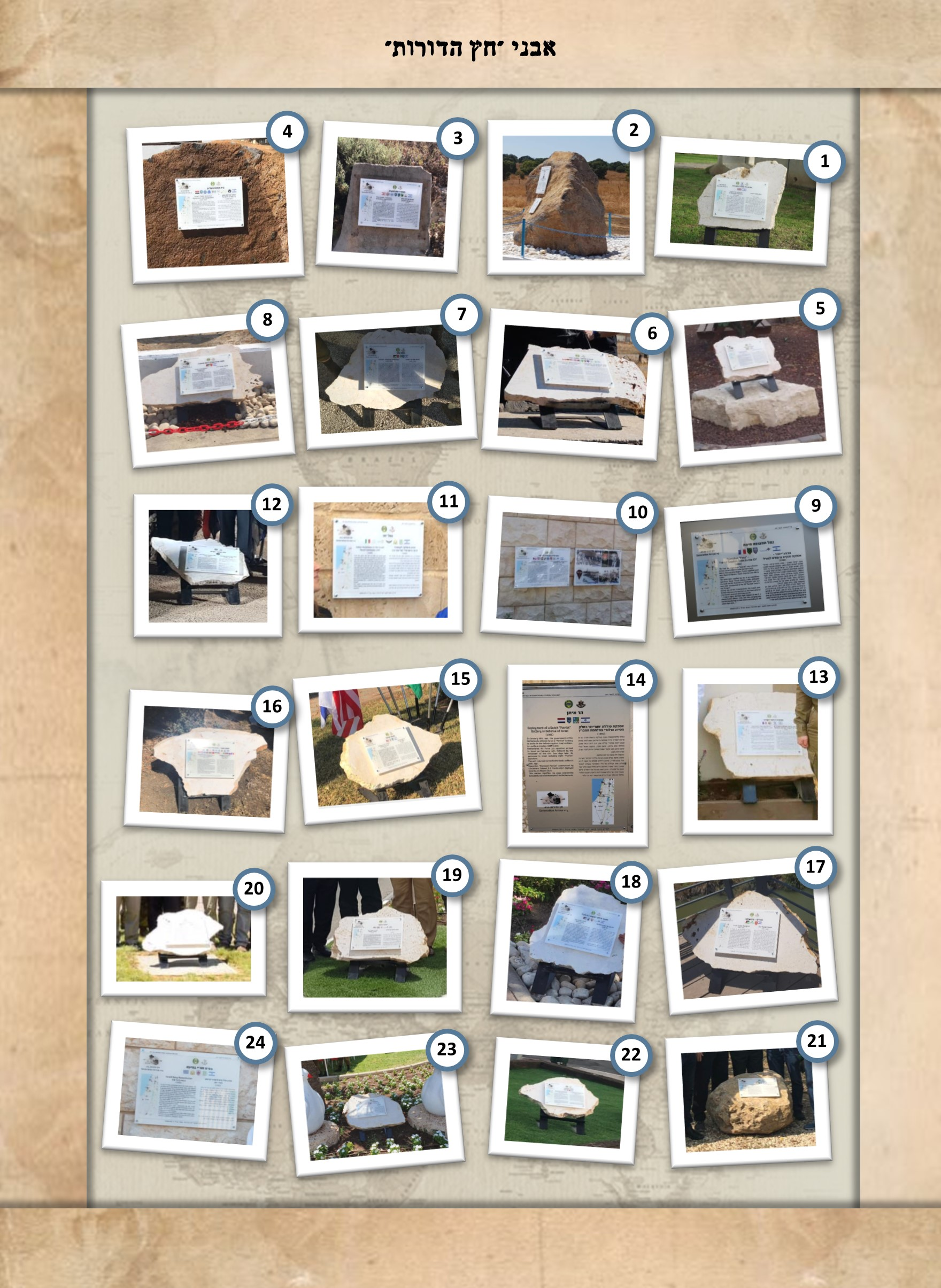 קולאז' אבני פרויקט המורשת "חץ הדורות" של החטיבה לקשרי חוץ